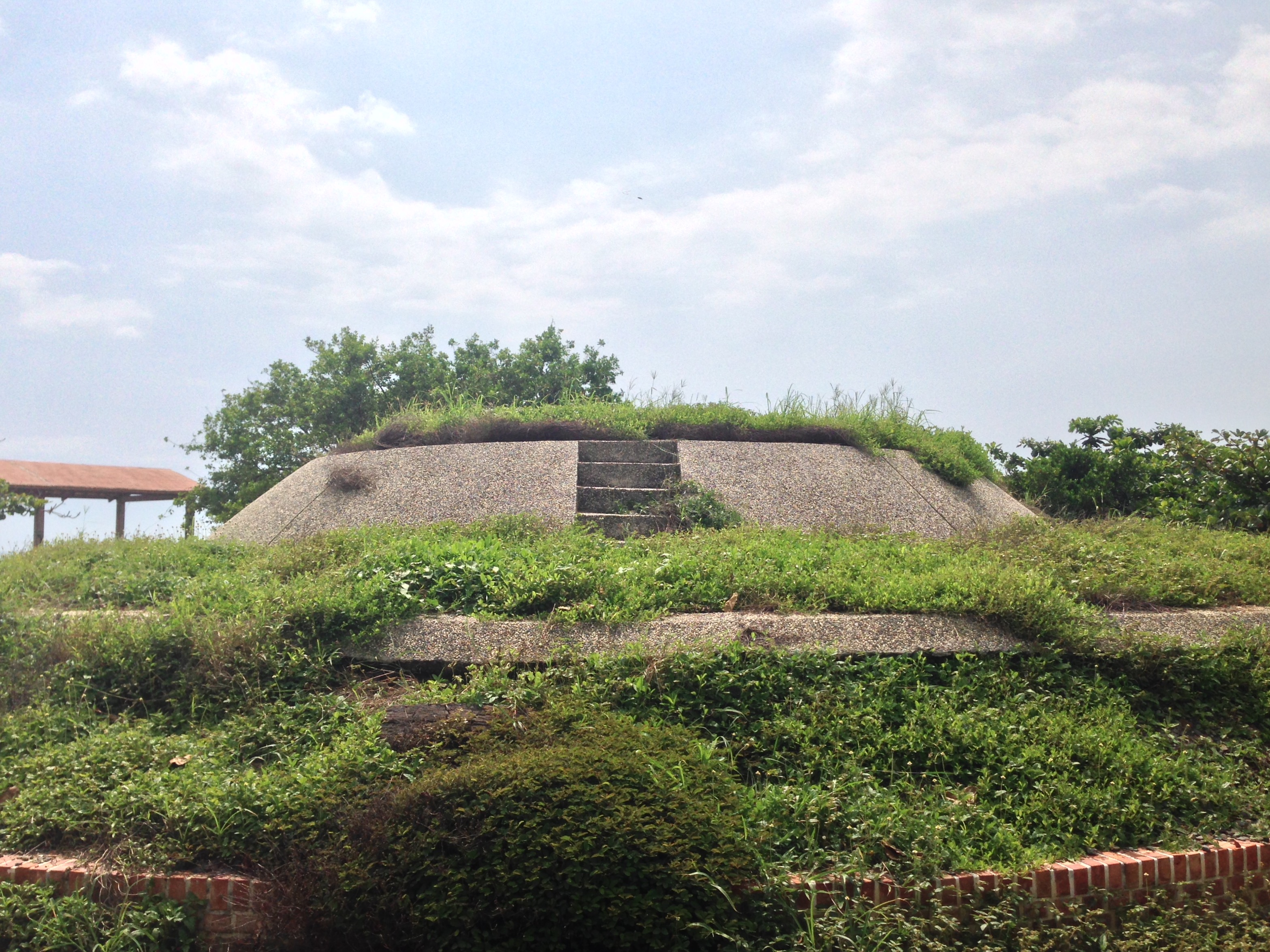 乃木將軍登陸紀念公園圓形土堆